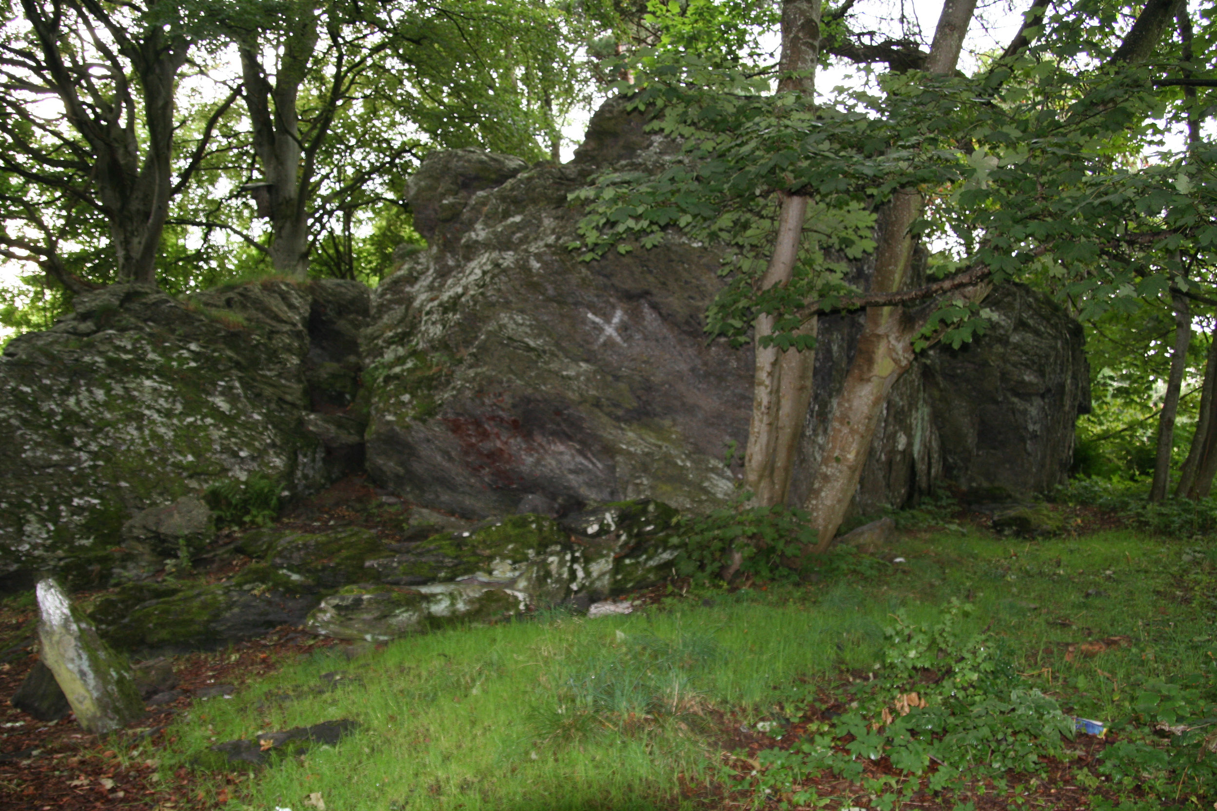 Vernet flyttblokk på Eiganes, Stavanger